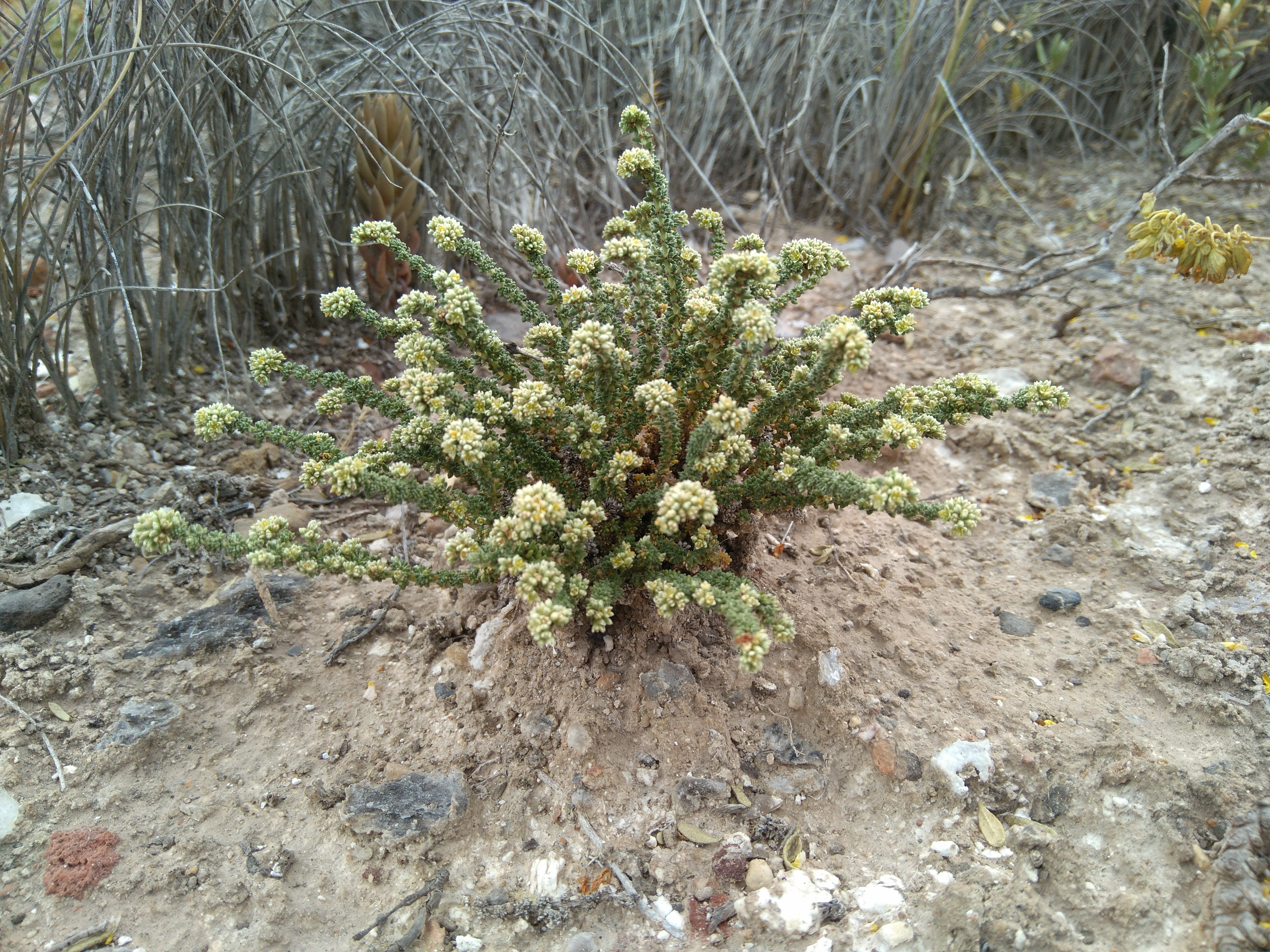 Toma del endemismo ibero-levantino Herniaria fruticosa.